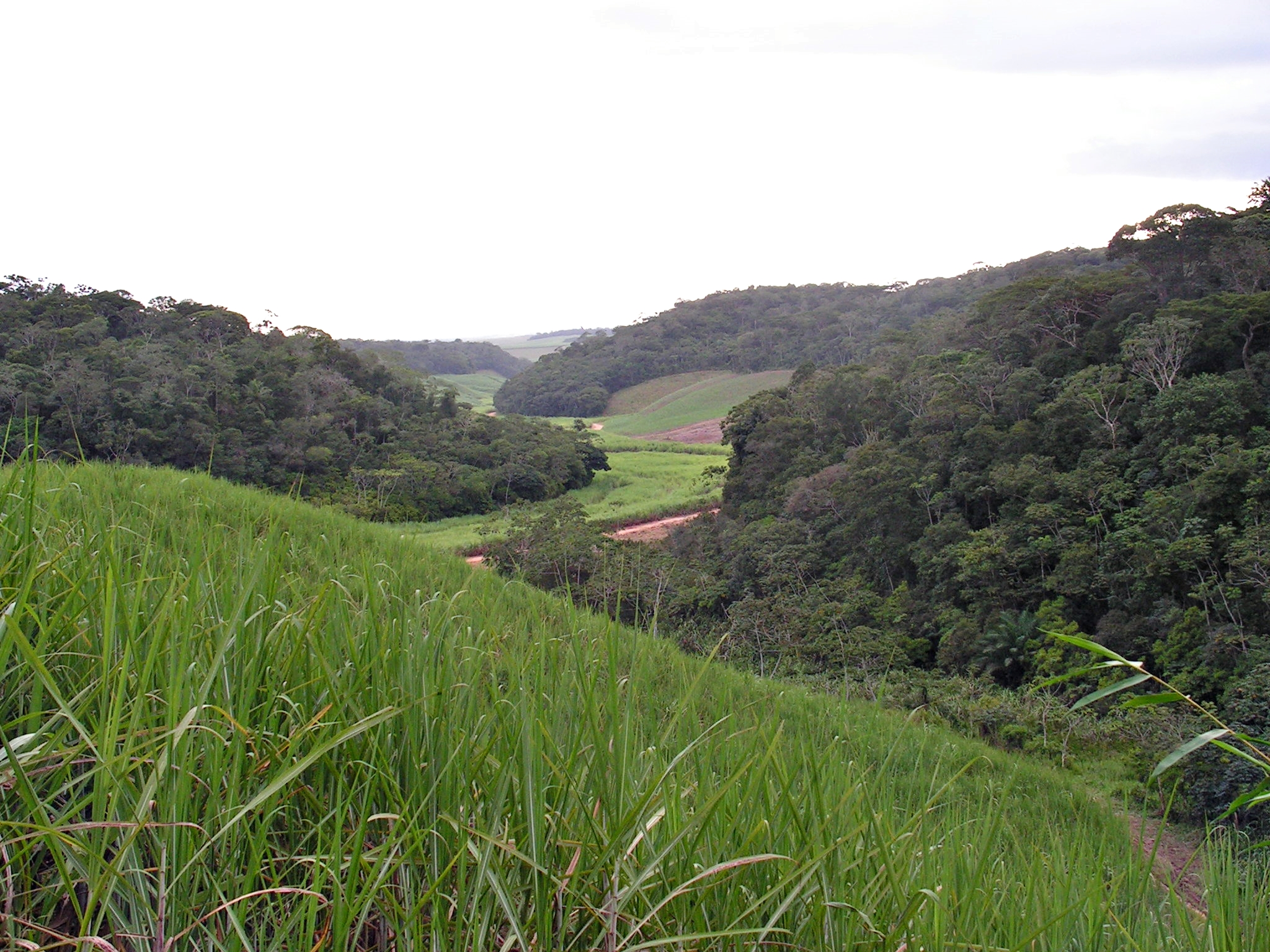 Mata Atlântica em usina de cana-de-açúcar — Pernambuco, Brasil